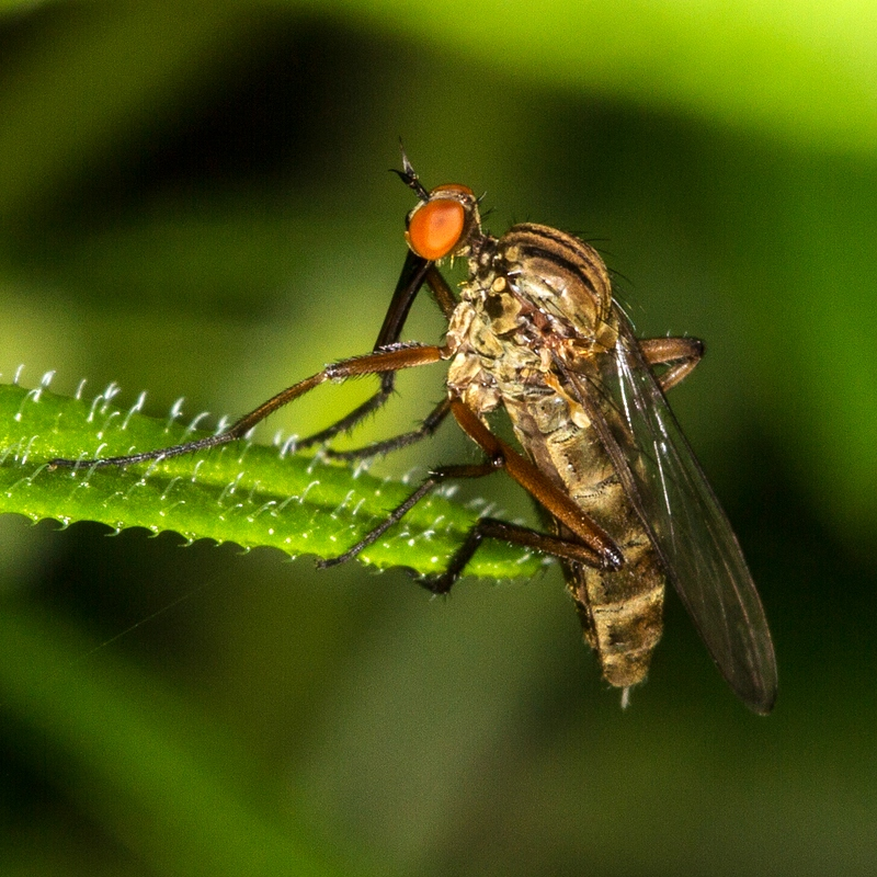 Sachsen: Tanzfliege